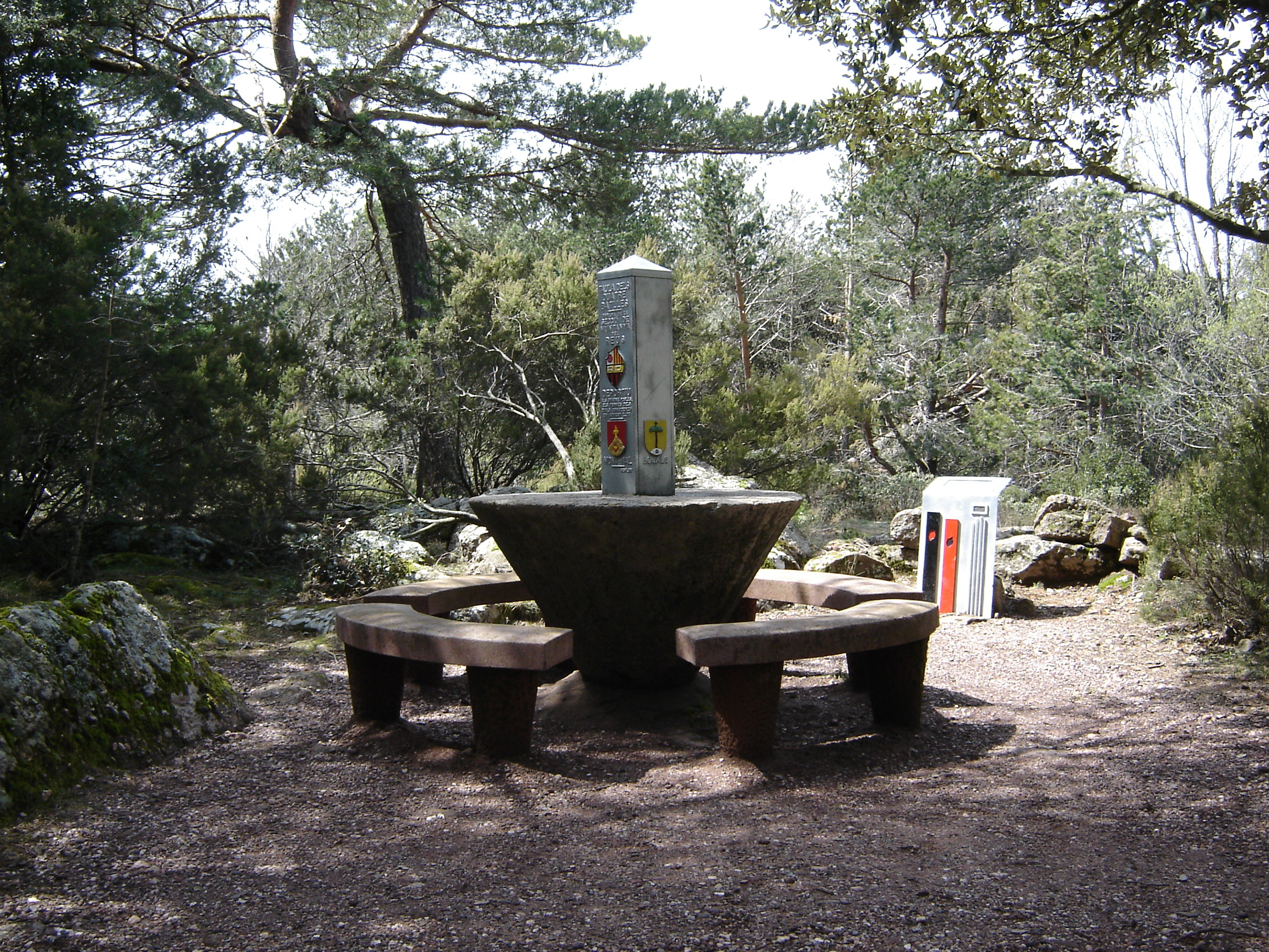 La Taula dels Quatre Batlles és una taula massissa circular de pedra, situada al punt geogràfic on convergeixen els termes de Montblanc (antigament Rojals), Vimbodí i Poblet, Mont-ral i Prades. Situada a les muntanyes de prades, Catalunya